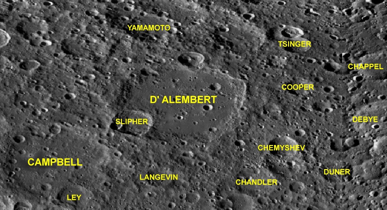 Cráter lunar Slipher. Localización. (Imagen LRO)